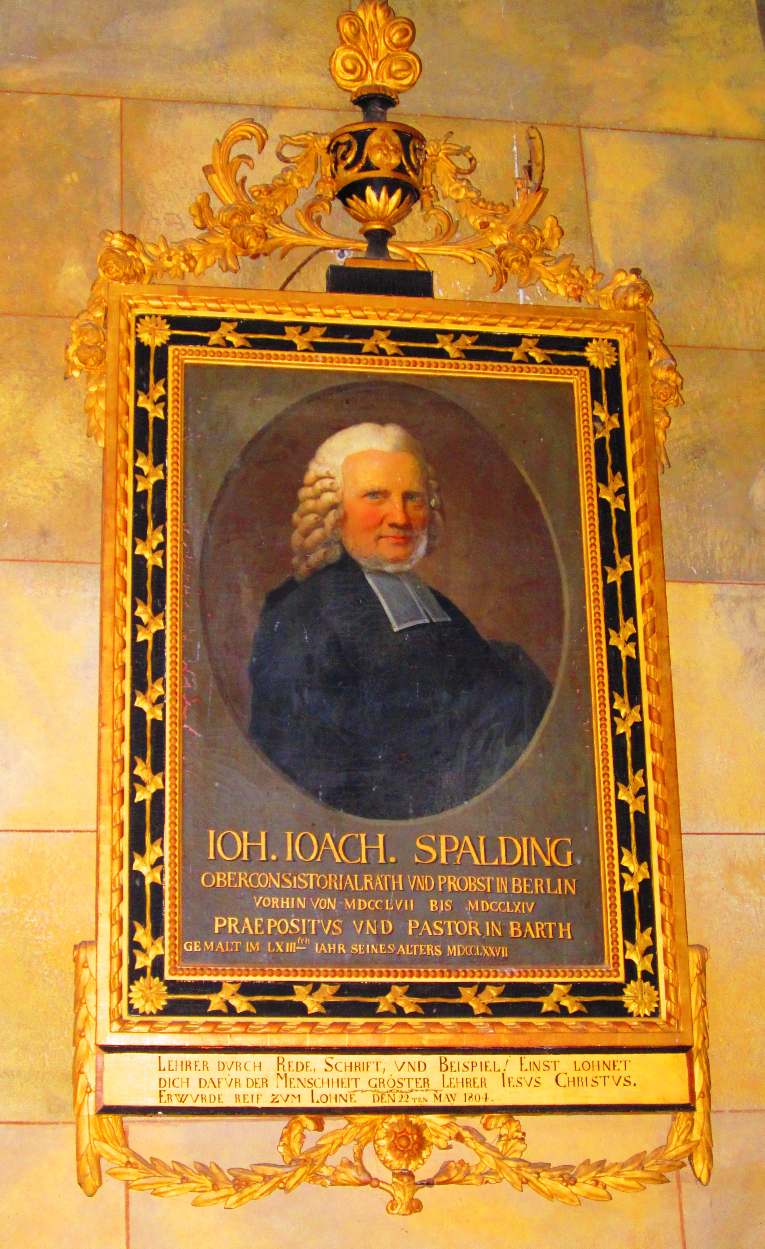 Bildnis Johann Joachim Spalding in der Barther Marienkirche, gemalt 1777